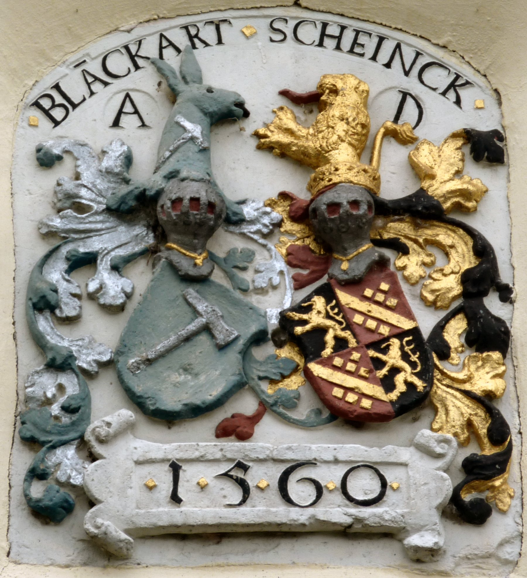 Berkum, Ortsteil von Wachtberg, Burg Odenhausen, Wappen über dem Eingang zur Burg, Bla[n]ckart Schenck 1560 Wappen: optisch links: Blanckart (auch Blankart) von Ahrweiler optisch rechts: vermehrtes Wappen der Schenck von Nideggen (Nydeggen)